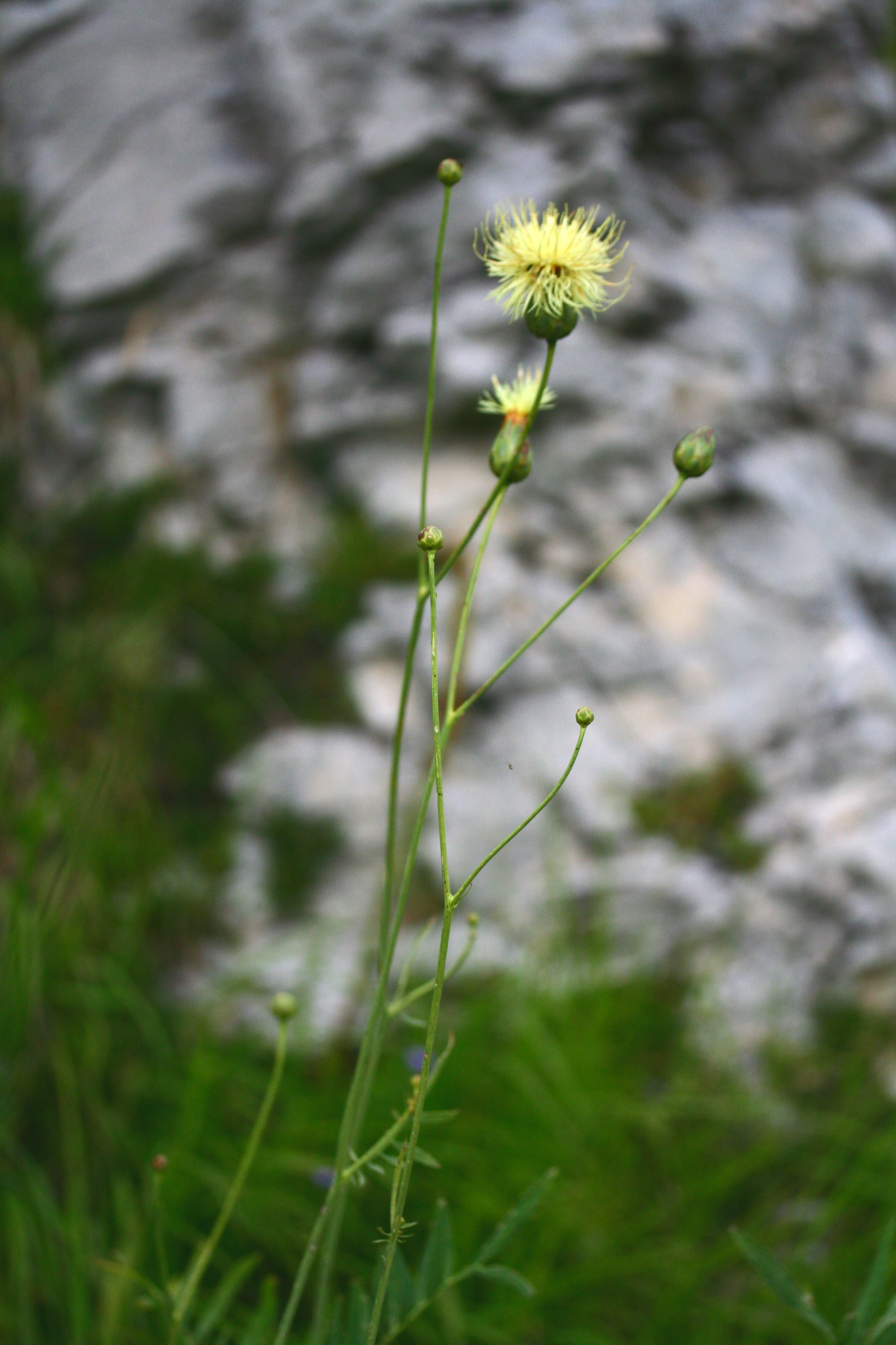 Rhaponticoides alpina (=Centaurea alpina) - Località: "Giardino Botanico delle Alpi Orientali", Monte Faverghera (BL), 1500 m s.l.m.